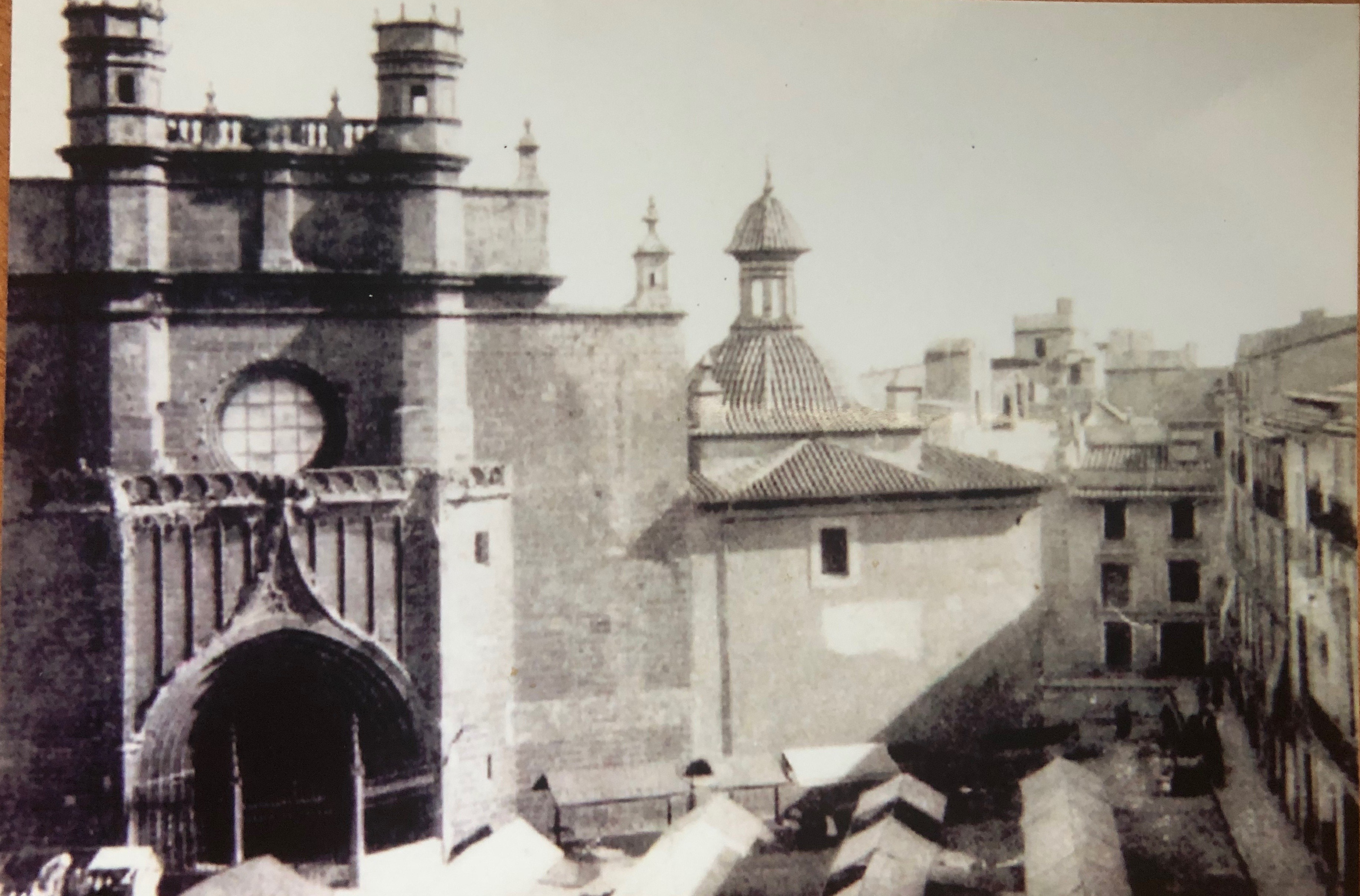 José Prades cedido por Sucine